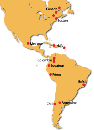 Implantation des Foyers de Charité en Amérique